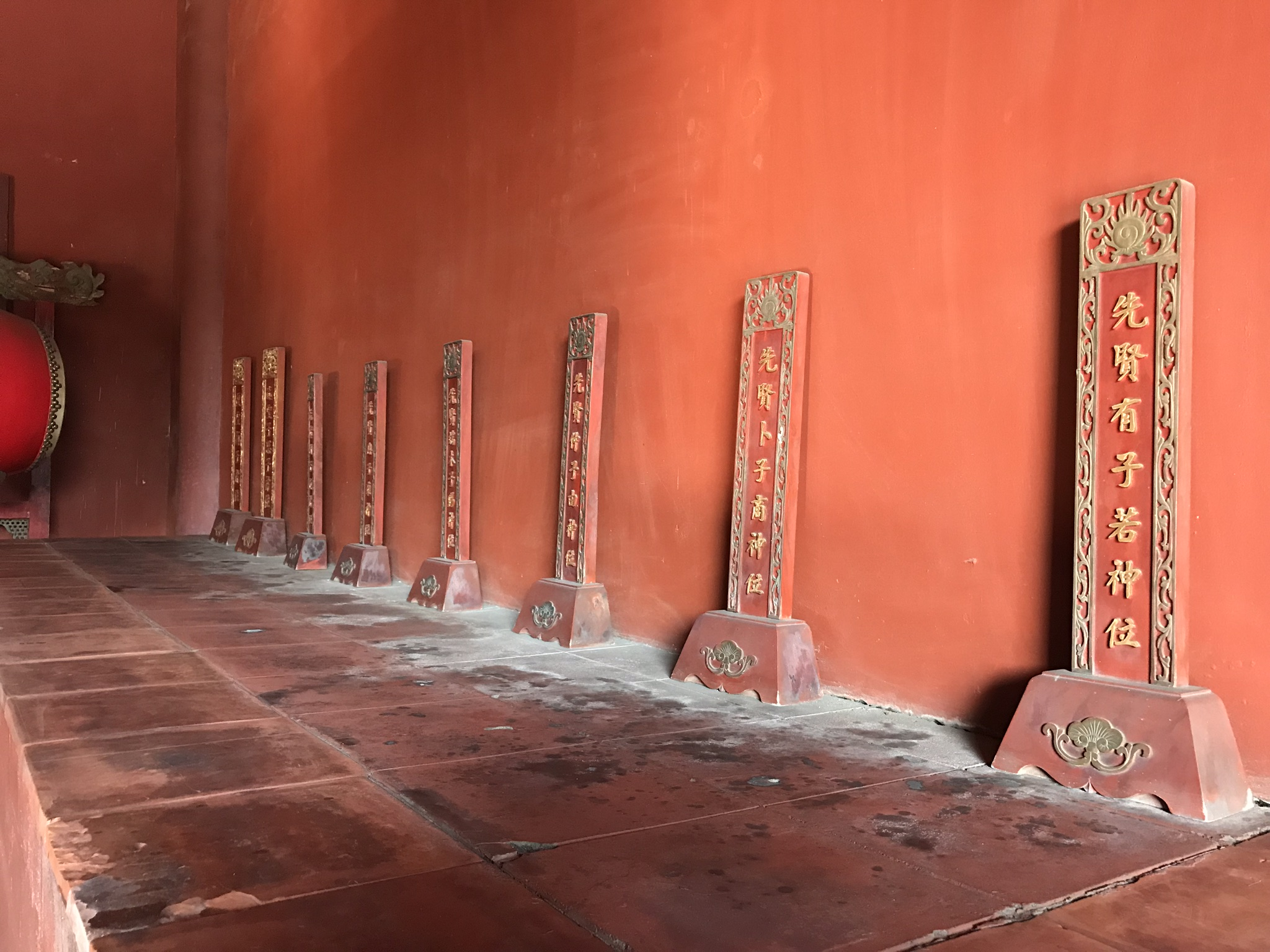 中文（台灣）: 彰化孔子廟牌位